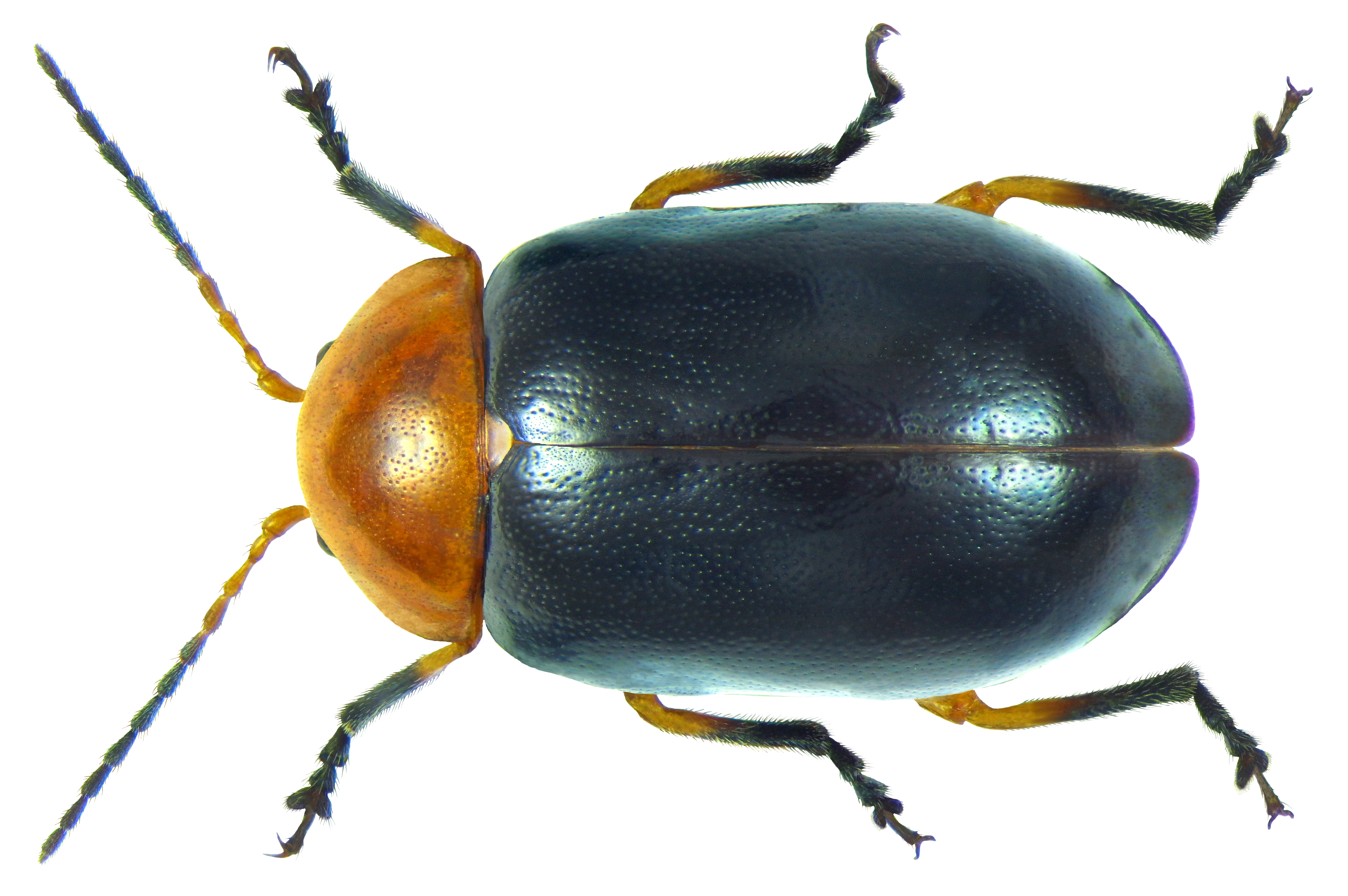 Ootheca bennigseni Weise, 1900 Familie: Chrysomelidae Groesse: 6,3 mm Fundort: Kenia, Mombasa, Diani Beach leg. U.Schmidt, 9.-19.IV.1990; det. Th.Wagner, 2012 Photo: U.Schmidt, 2012